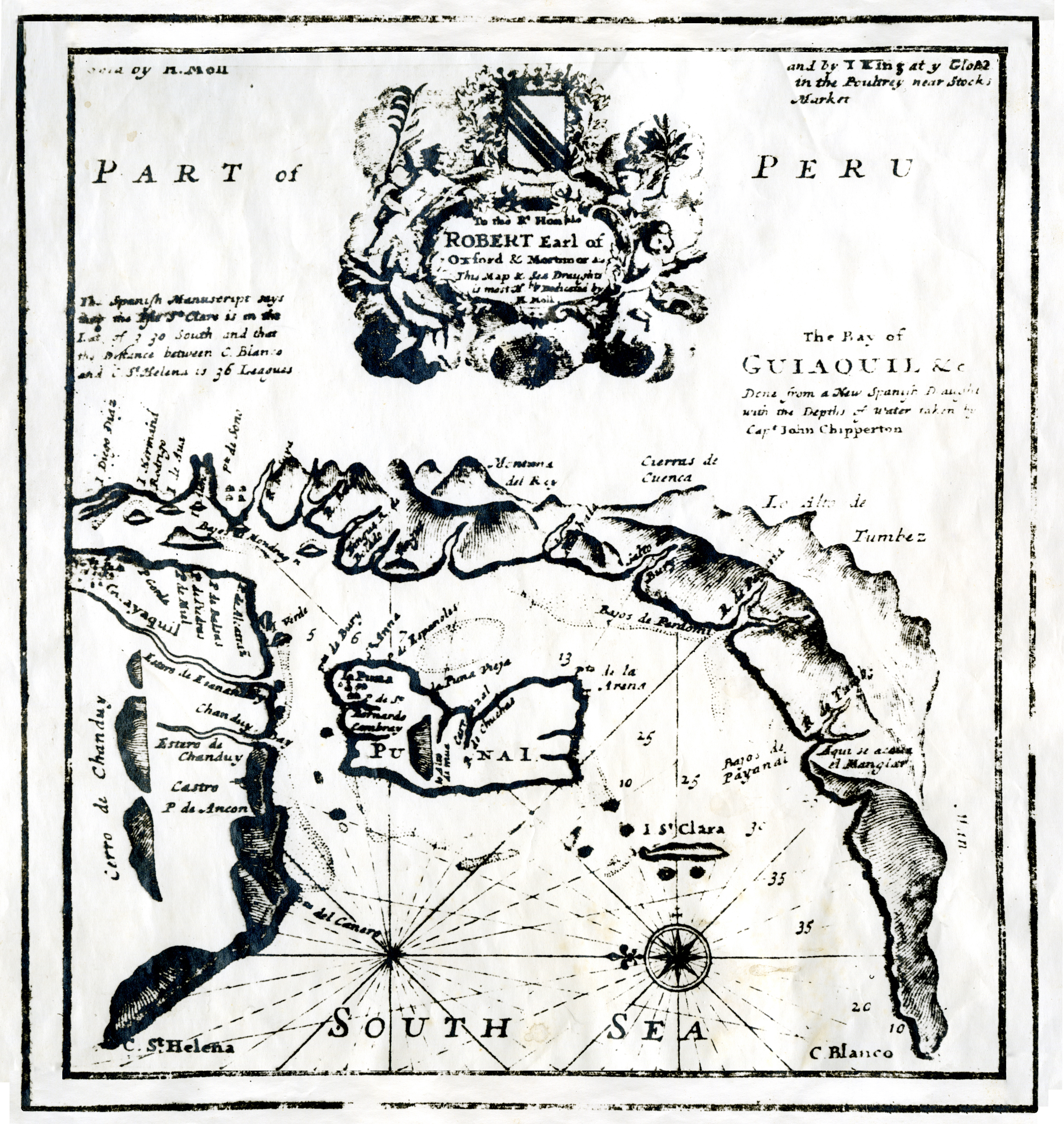 Mapa de la Bahía y Golgo de la Ciudad de Santiago de Guayaquil y sus inmediaciones, según el Capitán inglés John Clipperton dedicado al Conde Roberto de Oxford [1]. Diapositiva de Consulta y acceso publico cuya información fue investigada de un libro y/o ejemplar de revisión custodiado en los Fondos Bibliográficos (Sección Siglo XVII y XVIII o Etapa Colonial) del Archivo Histórico del Guayas; Guayaquil, Ecuador.